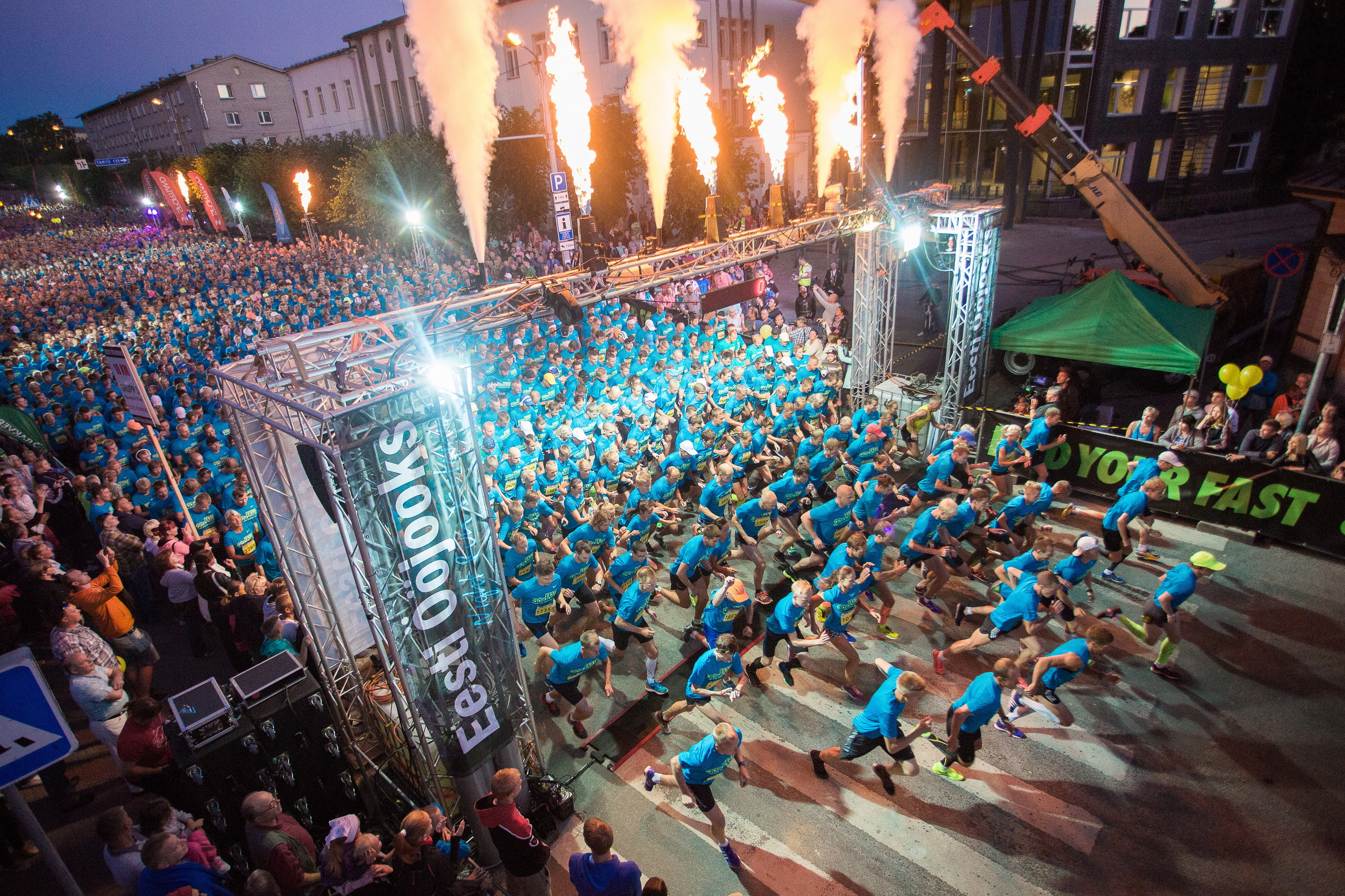 oojooksu start 2015 a